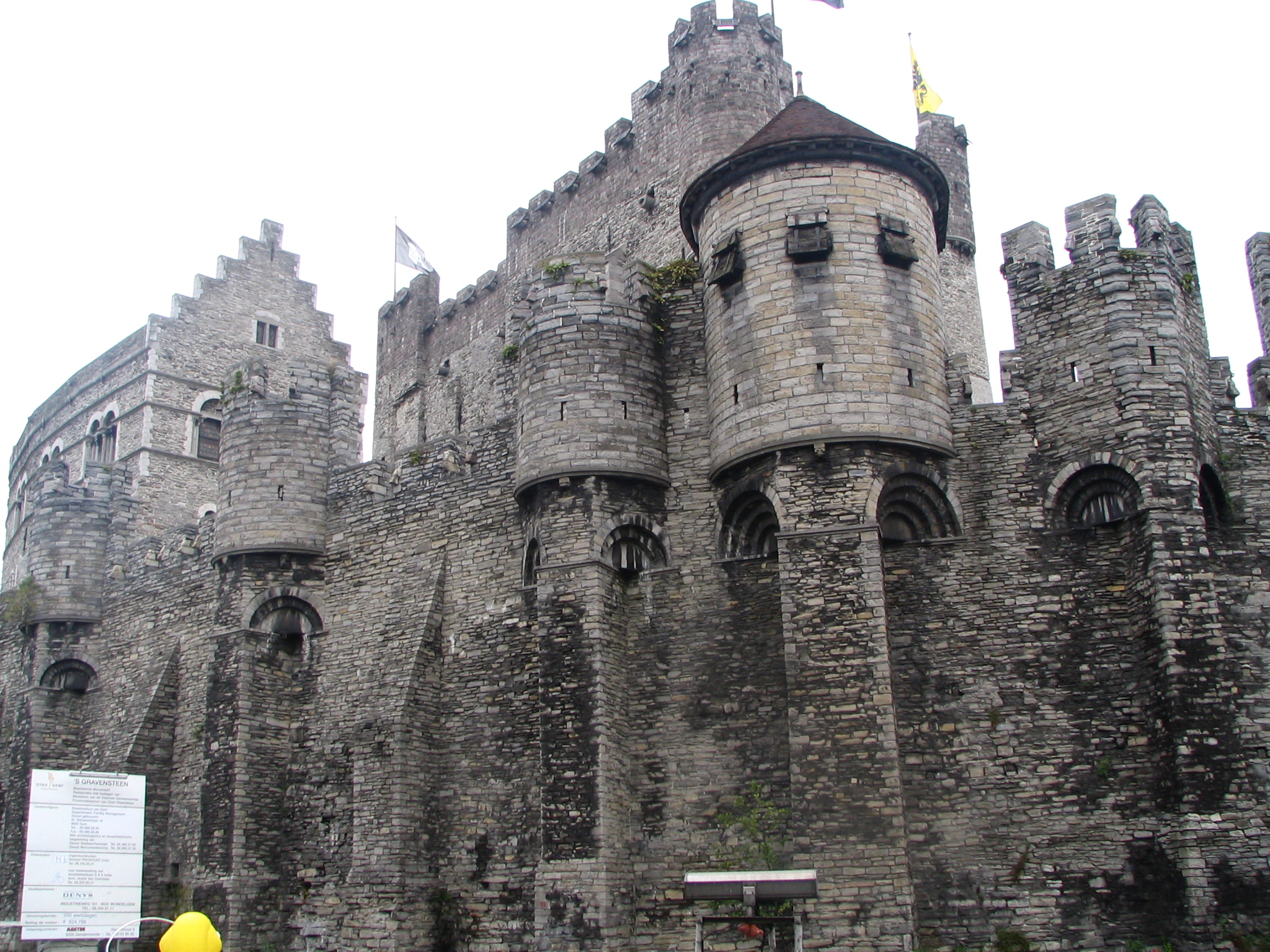 Gravensteen (Gent)